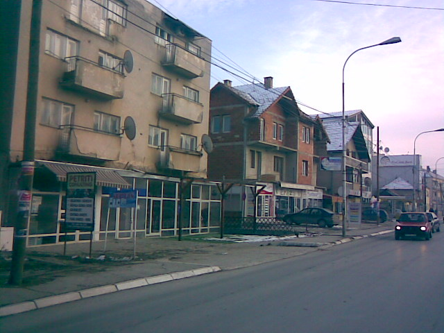 Vitina